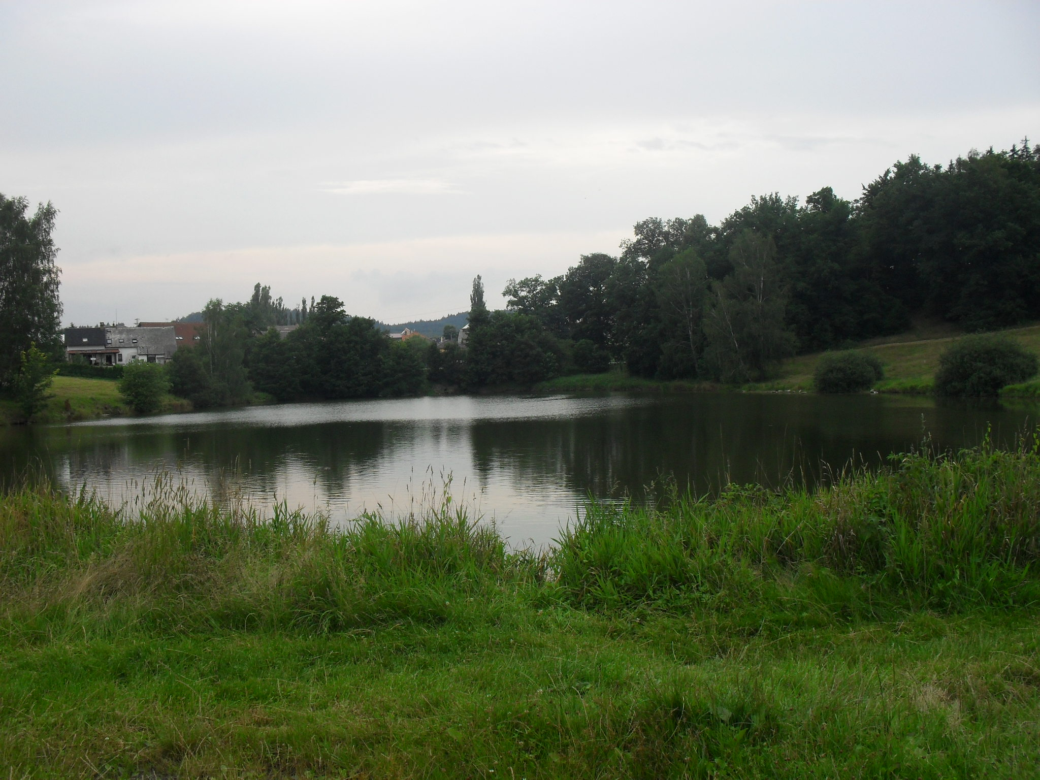 Tzv. rybník Kačák v liberecké čtvrti Krásná Studánka